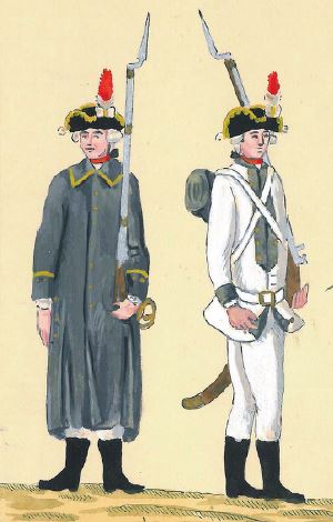 30. Mundury artylerii: szeregowy korpusu artylerii koronnej w płaszczu i w kurtce